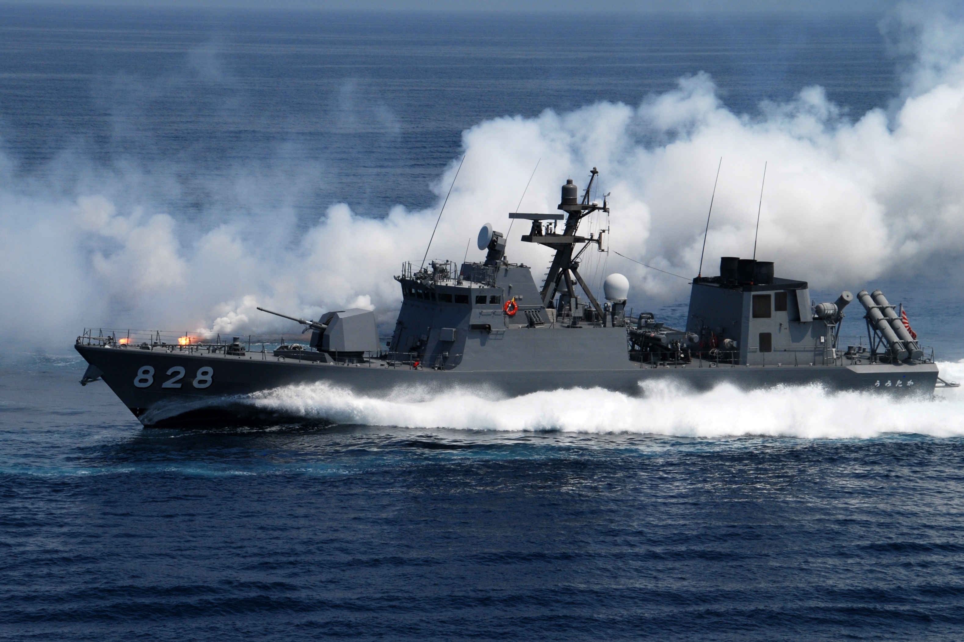 ミサイル艇うみたか